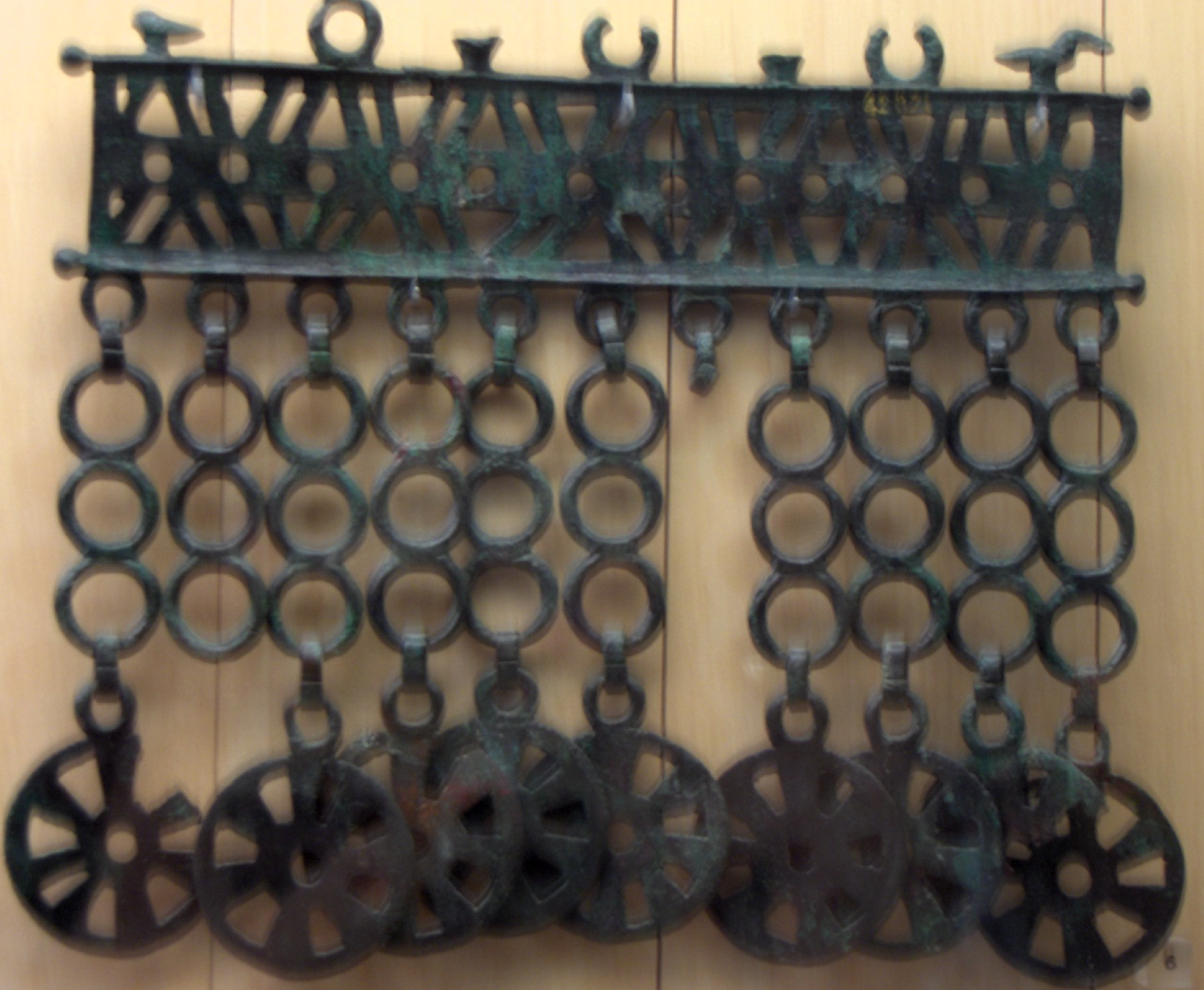 Pectoral, Les Moidons (Jura), bronze, âge du fer, musée des antiquités nationales, Saint-Germain-en-Laye